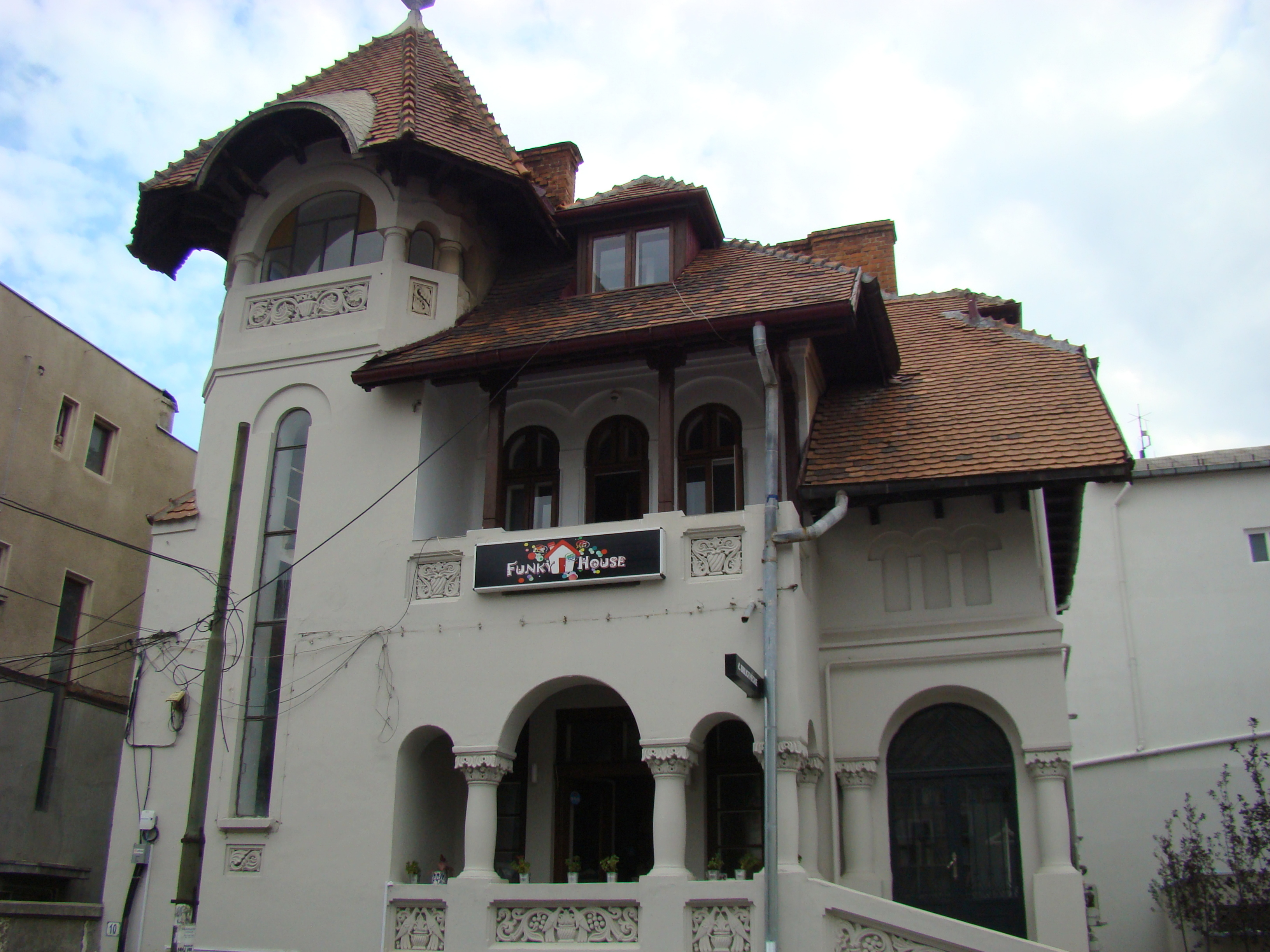 Clădire monument istoric, str. Duiliu Zamfirescu, nr.10